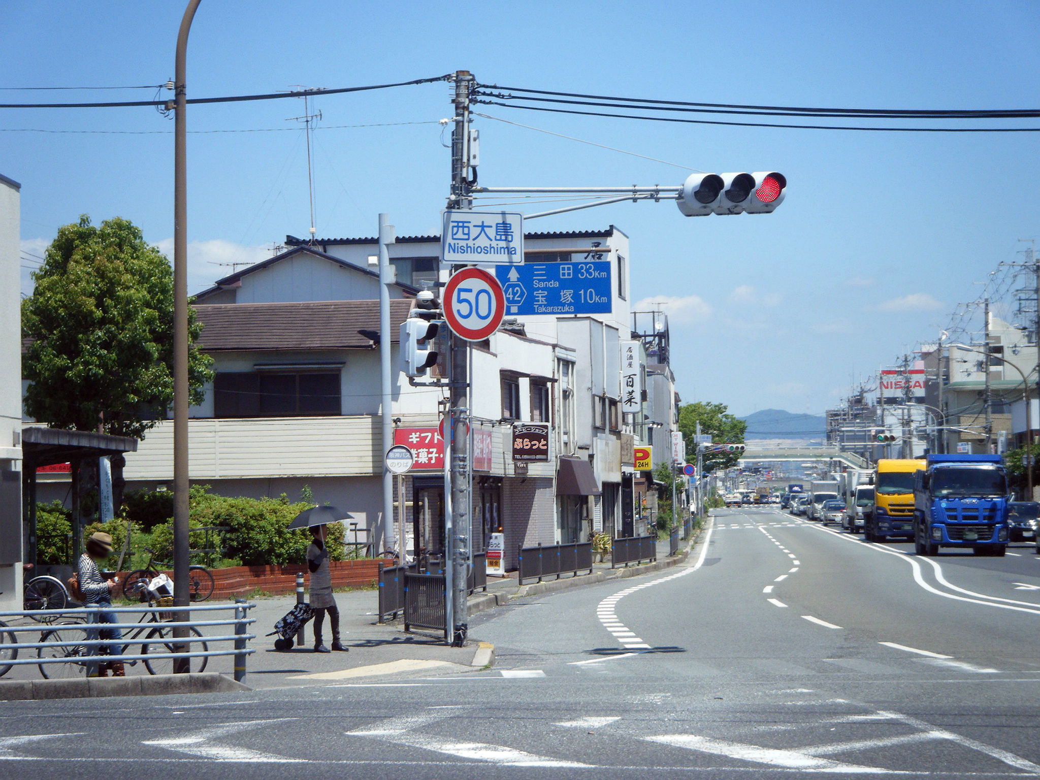 西大島交差点 尼宝線・宝塚方面を望む。